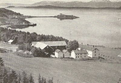 Gården Sve i daværende Skatval kommune, med utsikt mot Steinvikholm slott.